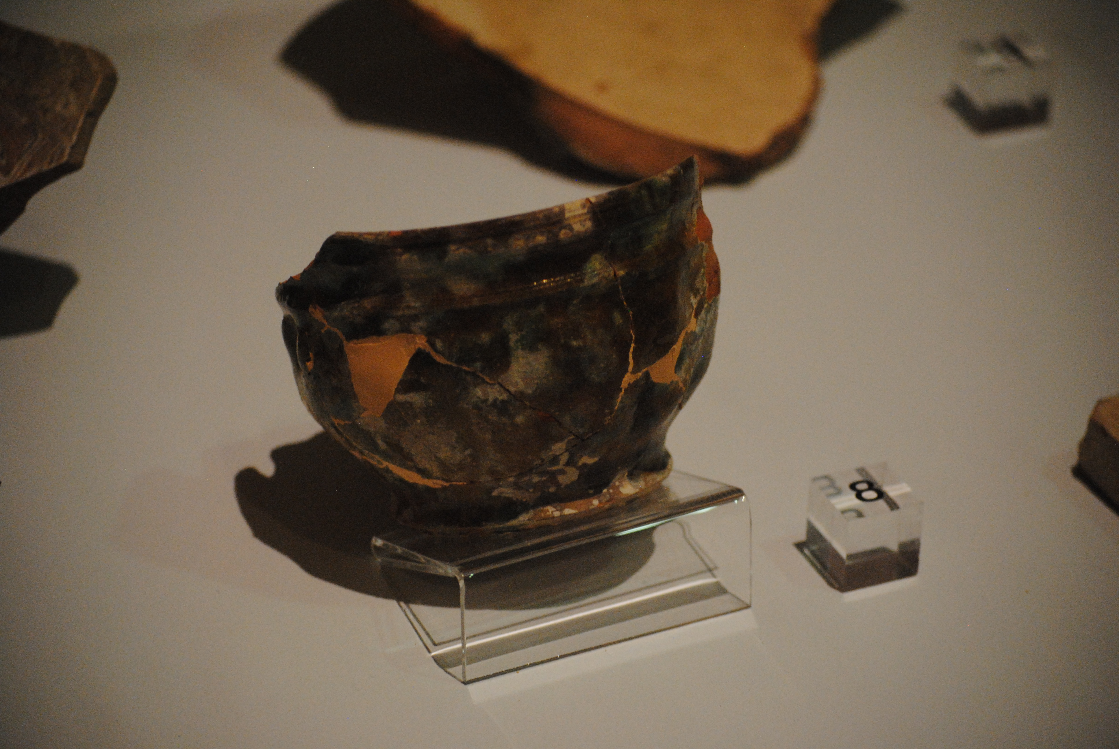 Ciotola ingobbiata maculata risalente al XVII secolo (recuperata durante gli scavi di via Sapienza, Pisa) - manifattura Bitozzi - Museo nazionale di San Matteo